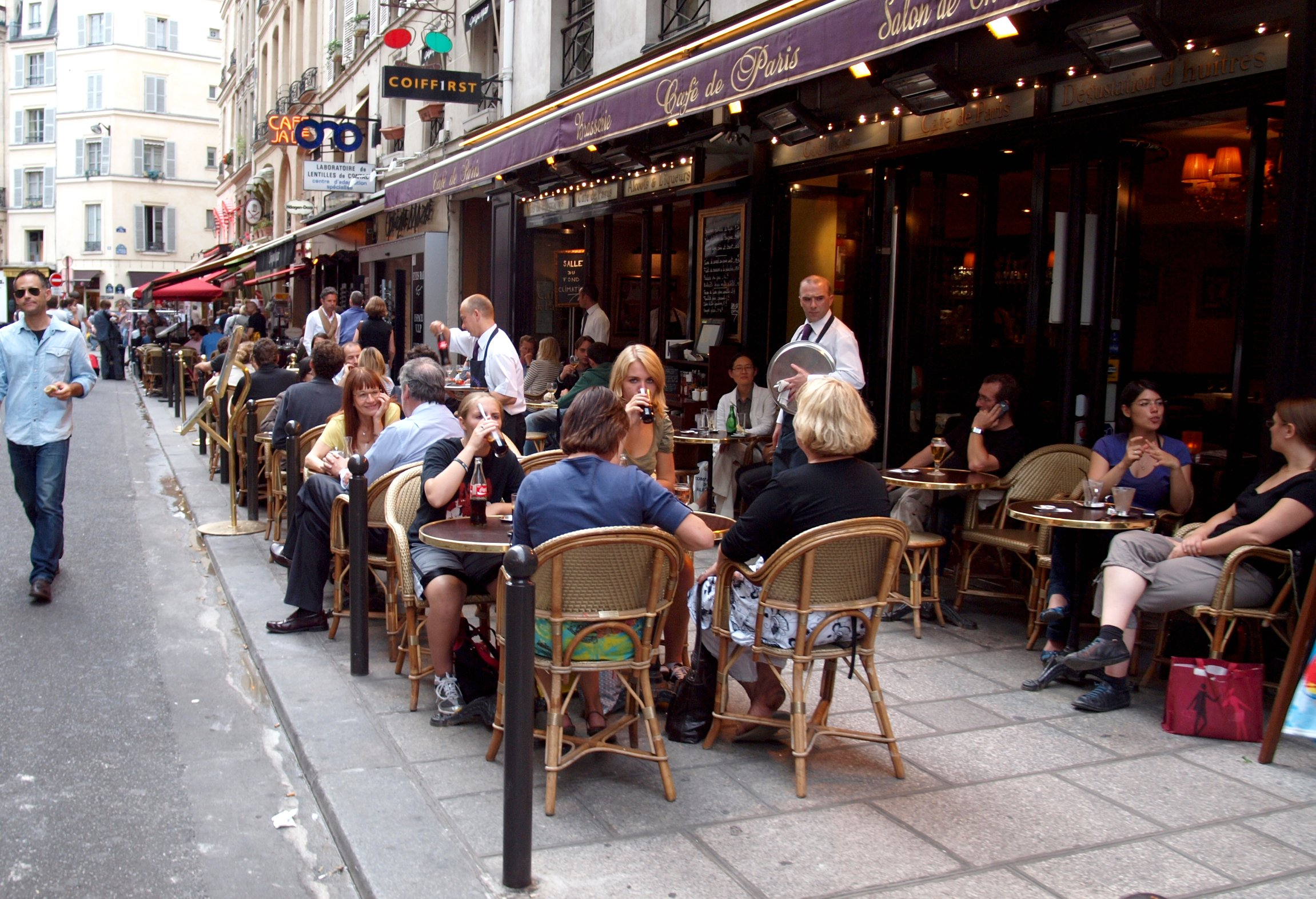 Terrace cafe, Rue de Buci, Paris, France.